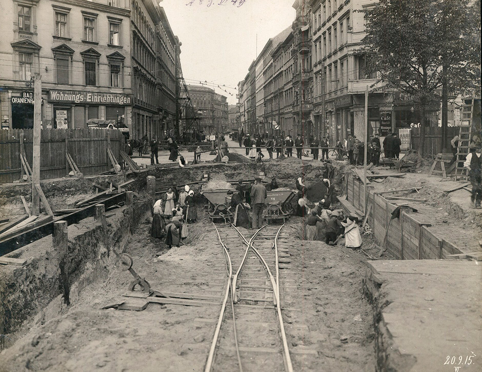 Berlin, Foto aus der Zeit des U-Bahn-Baus 1907–1915; ca. 28 x 23 cm. Mit Datum rechts unten. Oranienplatz mit Blick in die Dresdener Straße in Richtung Alexanderplatz (links "Bad Oranienplatz", Luisenufer, heute Legiendamm/Oranienplatz).